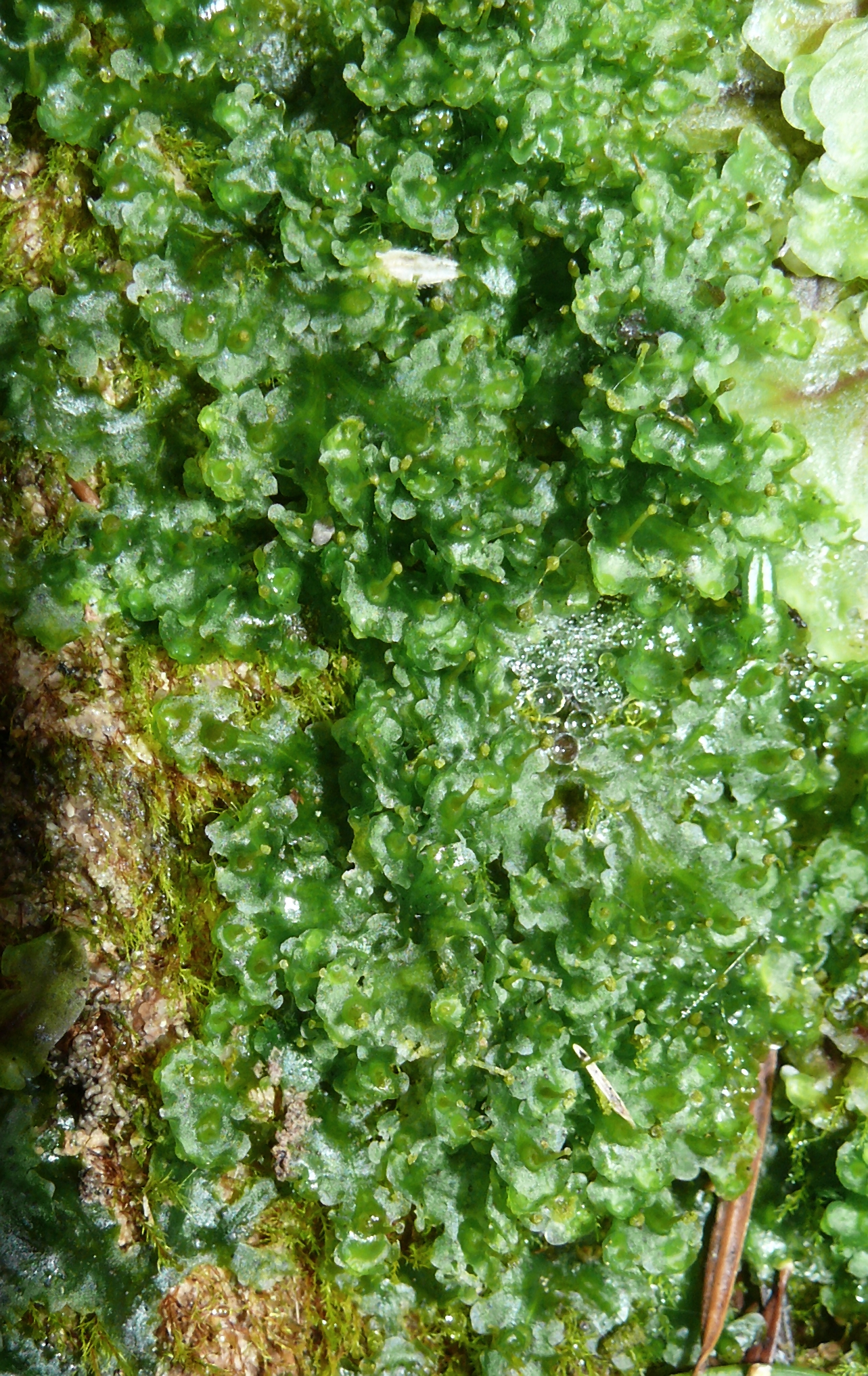 Blasia_pusilla, Schwäbisch-Fränkischer Wald, Deutschland